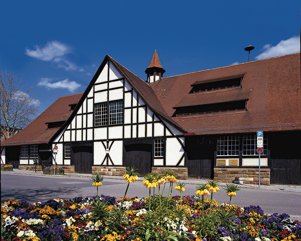 Weinbaumuseum Stuttgart Aussenansicht